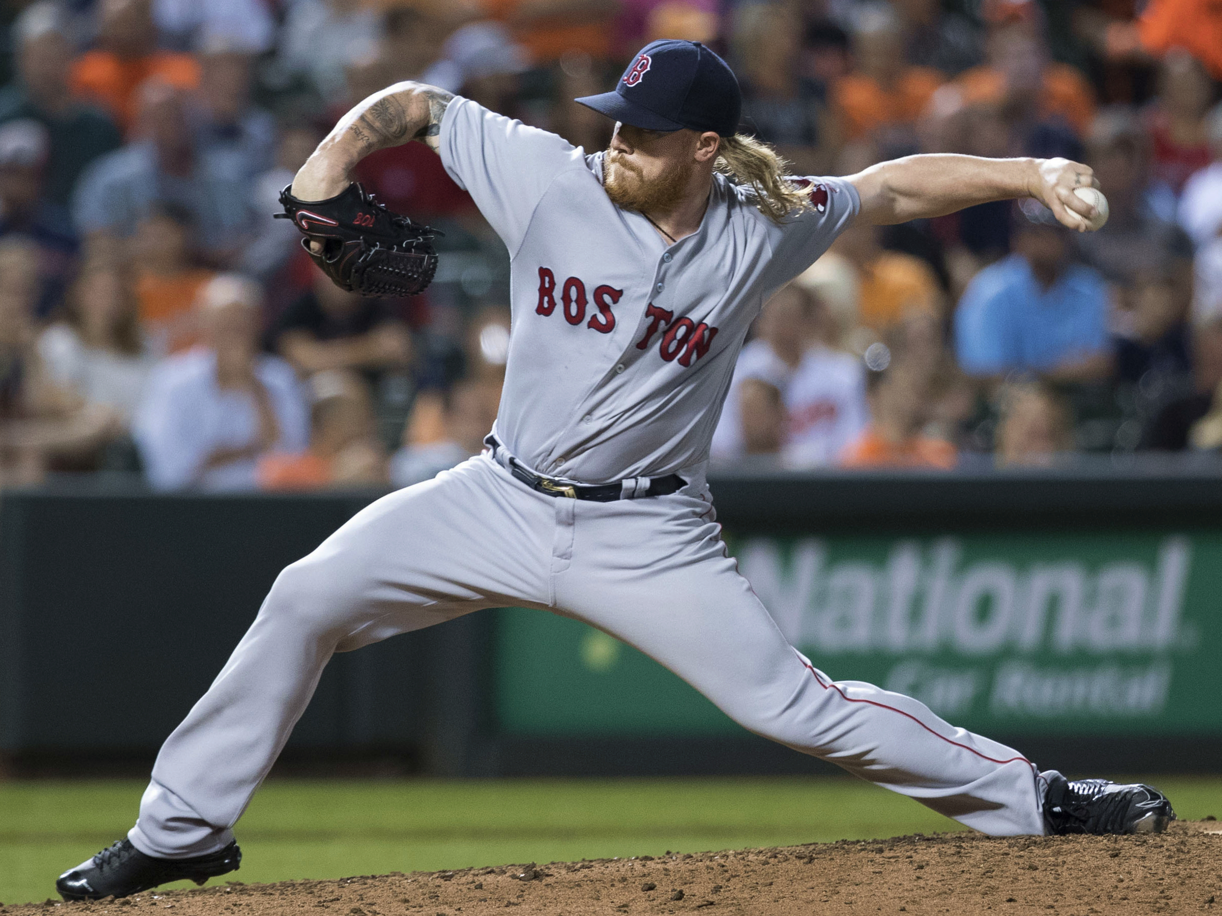 Robbie Ross Jr.